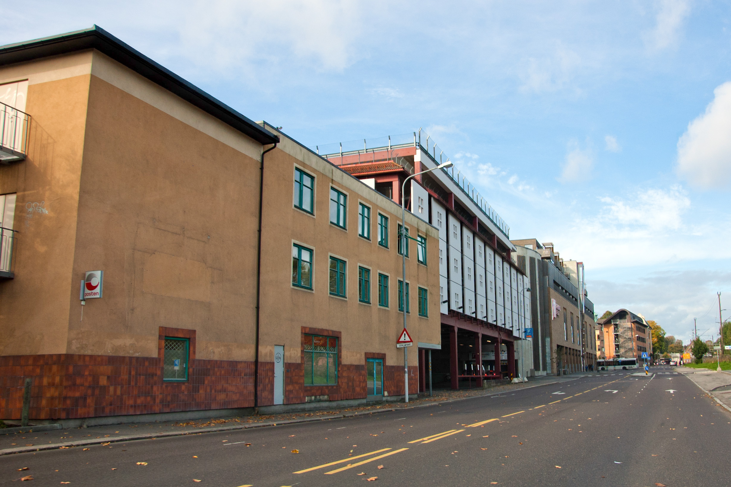 Jernbanegaten i Tønsberg, med Farmandstredet kjøpesenter. Bygningen i midten er parkeringshuset.